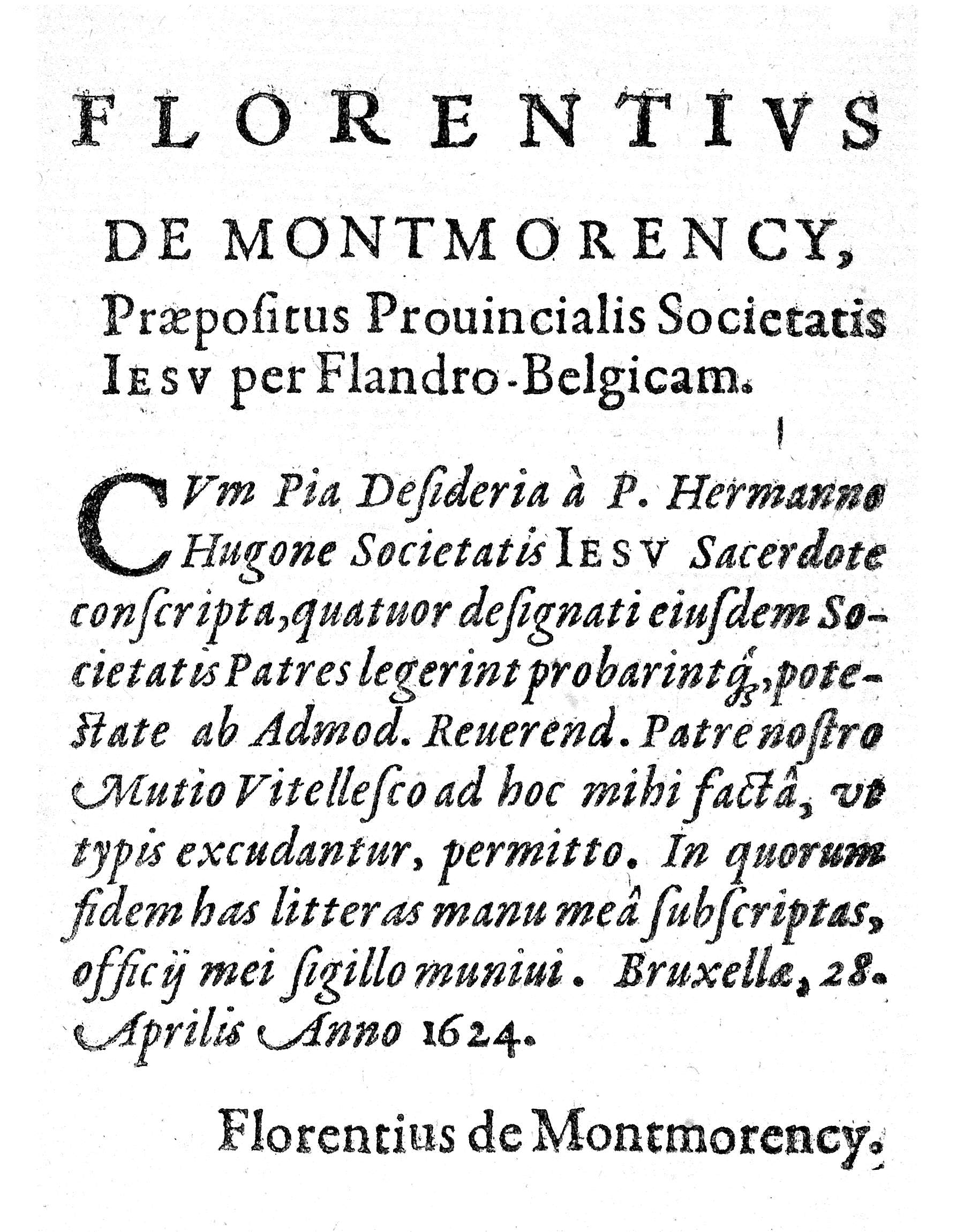 Florent de Montmorency (1580-1659) Florentivs de Montmorency, Praepositus Prouincialis Societatis Iesv per Flandro-Belgicam CVm Pia Desideria à P. Hermanno Hugone Societatis Iesv Sacerdote conscripta, quatuor designati eiusdem So- cietatis Patres legerint probarintq́, pote- state ab Admod. Reuerend. Patre nostro Mutio Vitellesco ad hoc mihi factâ, vt typis excudantur, permitto. In quorum fidem has litter as manu meâ subscriptas, officij mei sigillo muniui. Bruxellae, 28. Aprilis Anno 1624. Florentius de Montmorency.